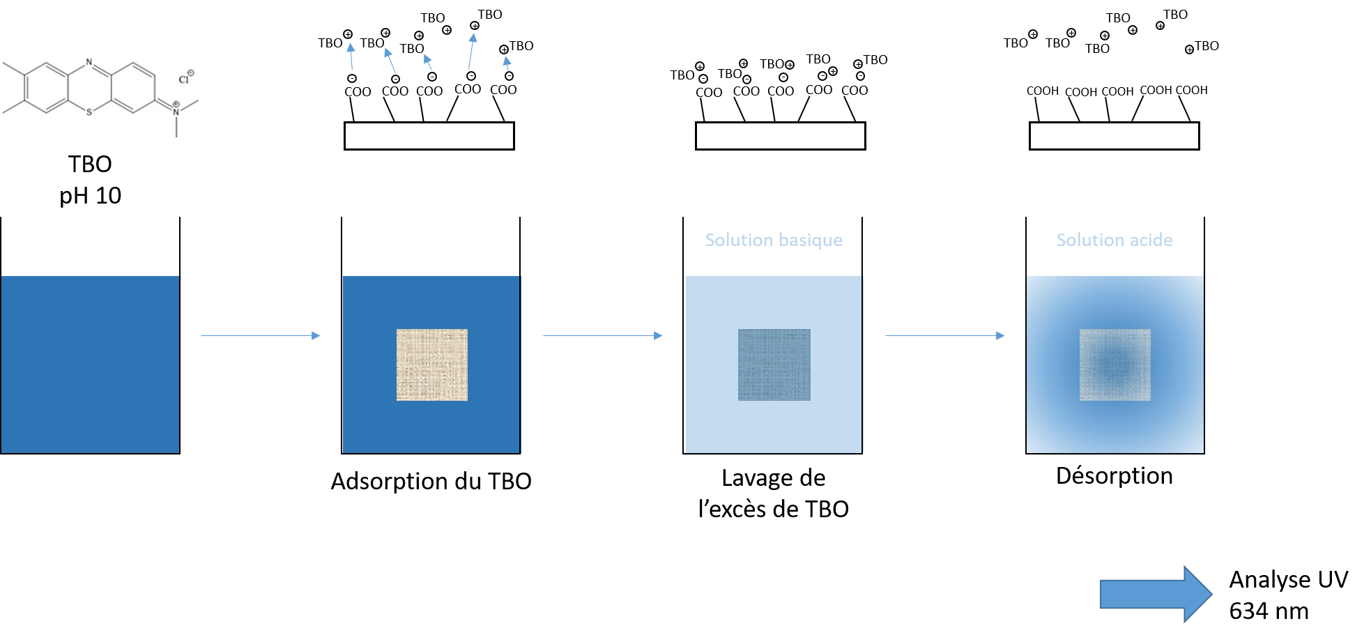 Complexation et désorption du TBO sur une membrane contenant des acides carboxyliques en surface